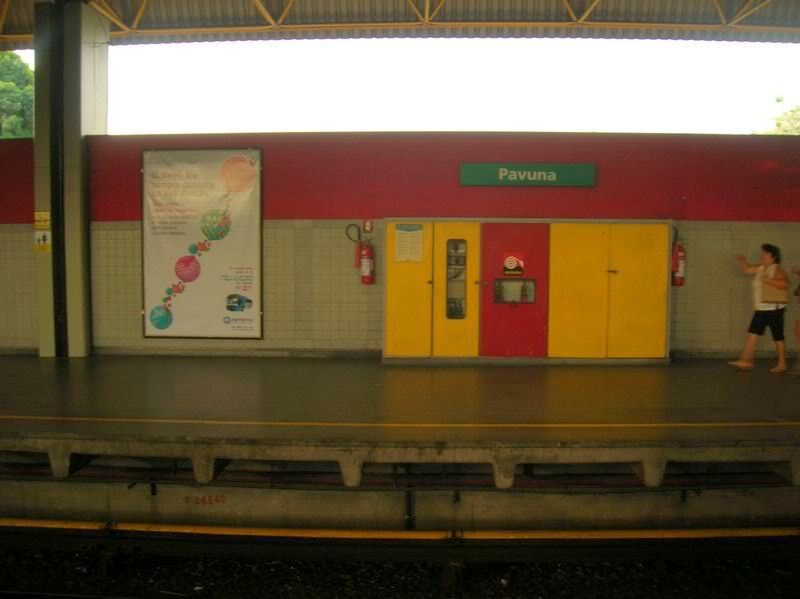 Foto da estação Pavuna do Metrô Rio